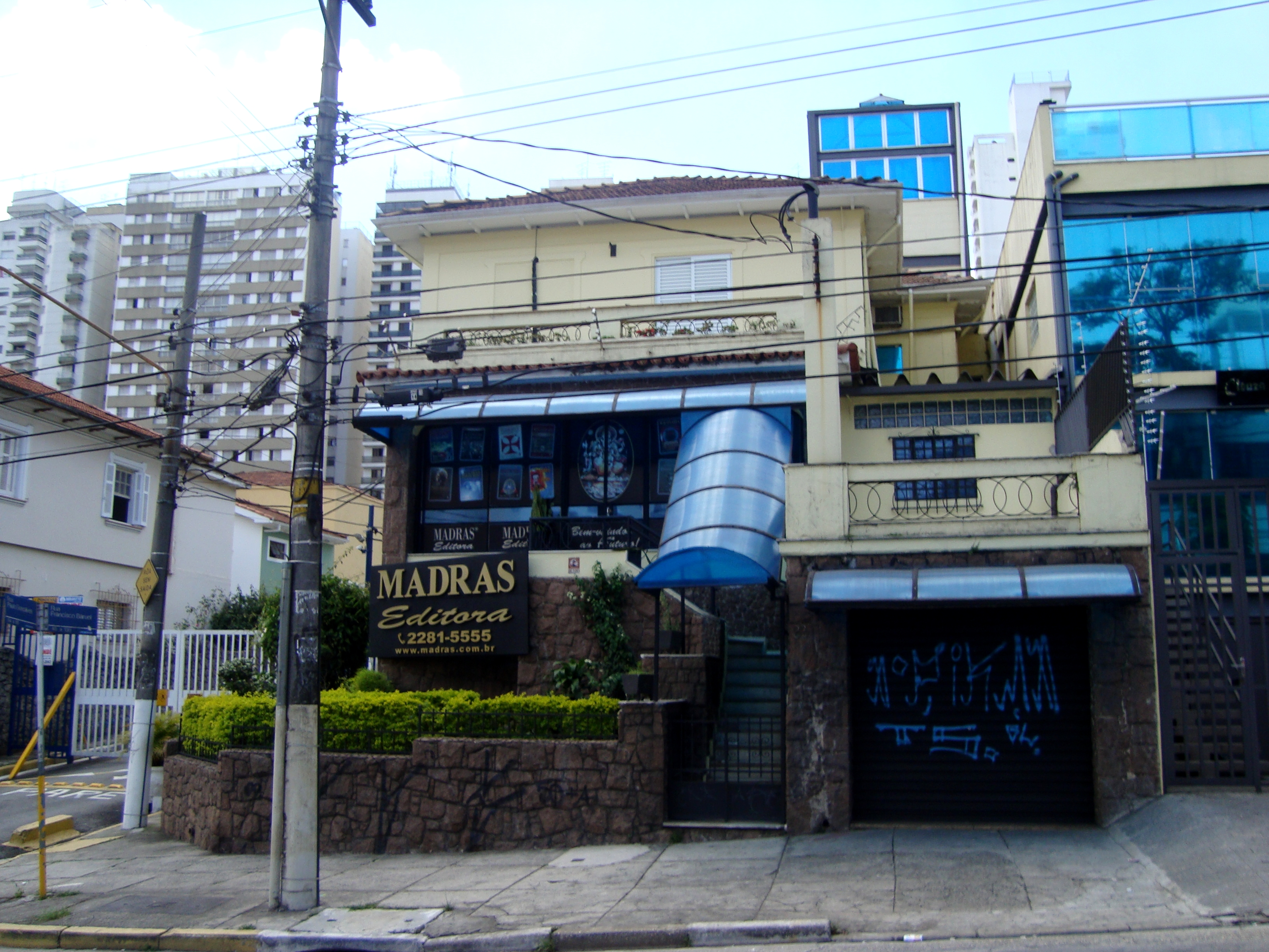 Foto da fachada da Madras Editora no Alto de Santana, São Paulo/SP